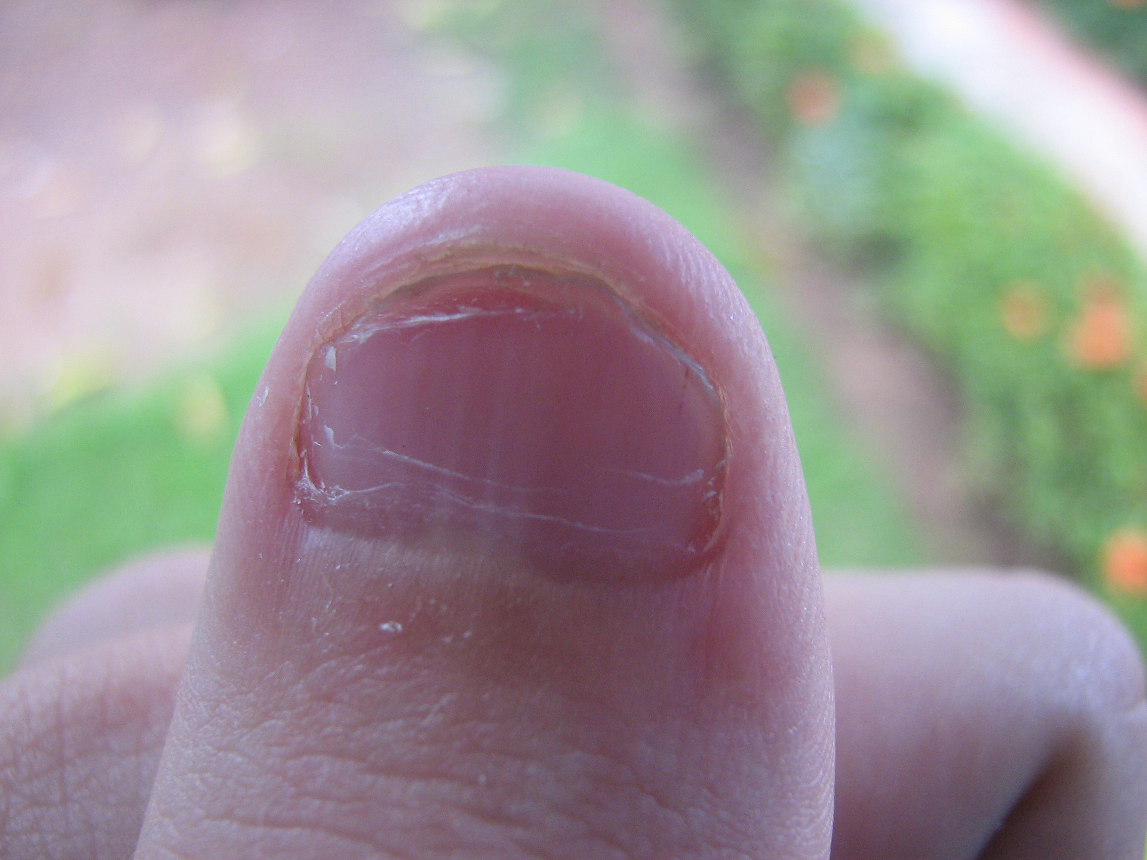 Meu dedo polegar